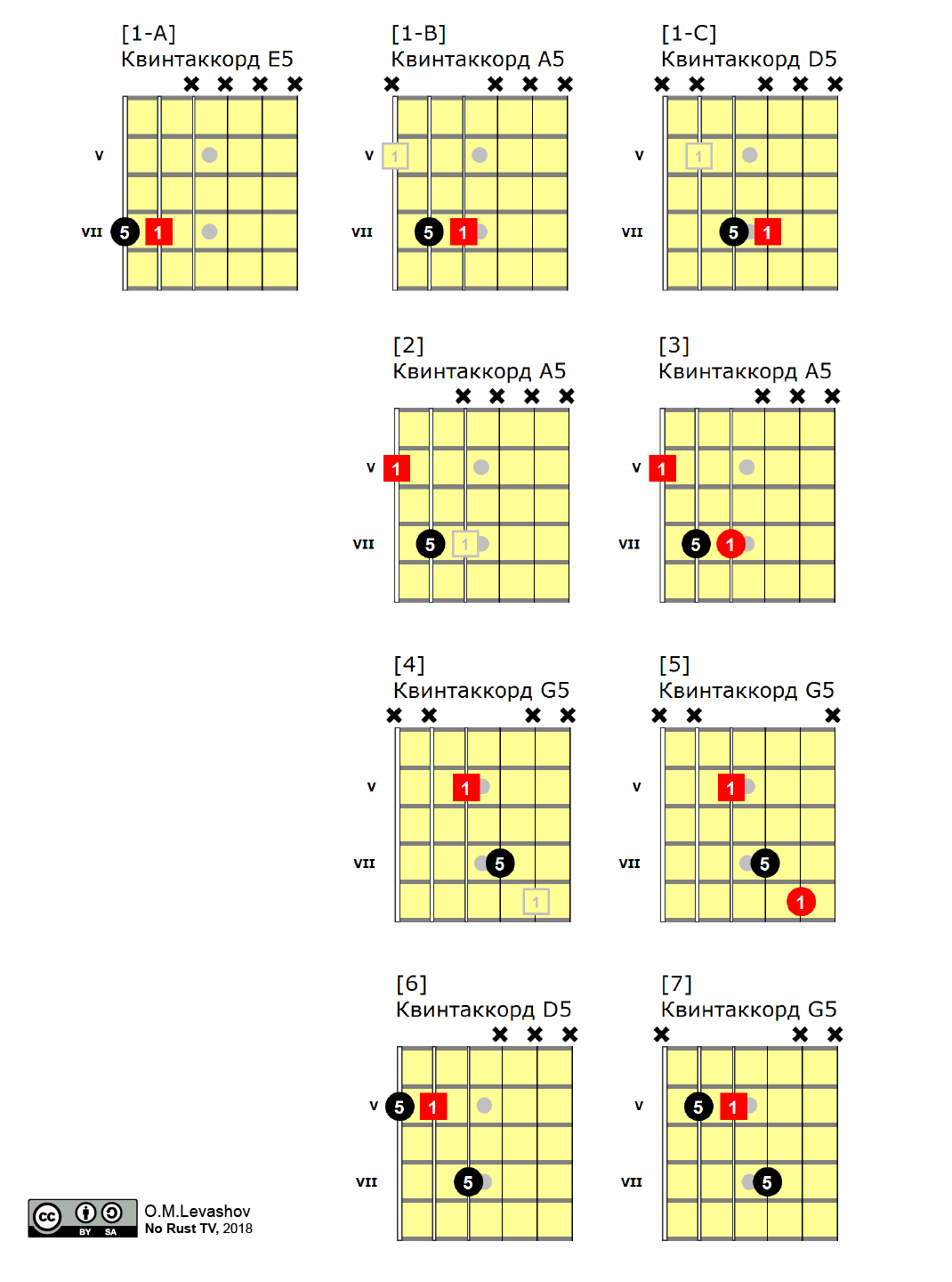 Самые распространённые аппликатуры квинтаккордов